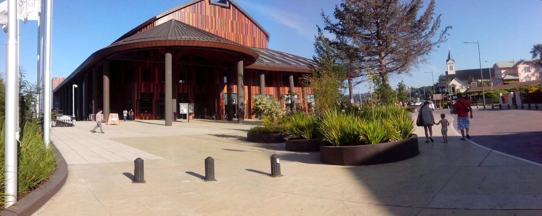 Fotografía del Teatro del Lago - Frutillar